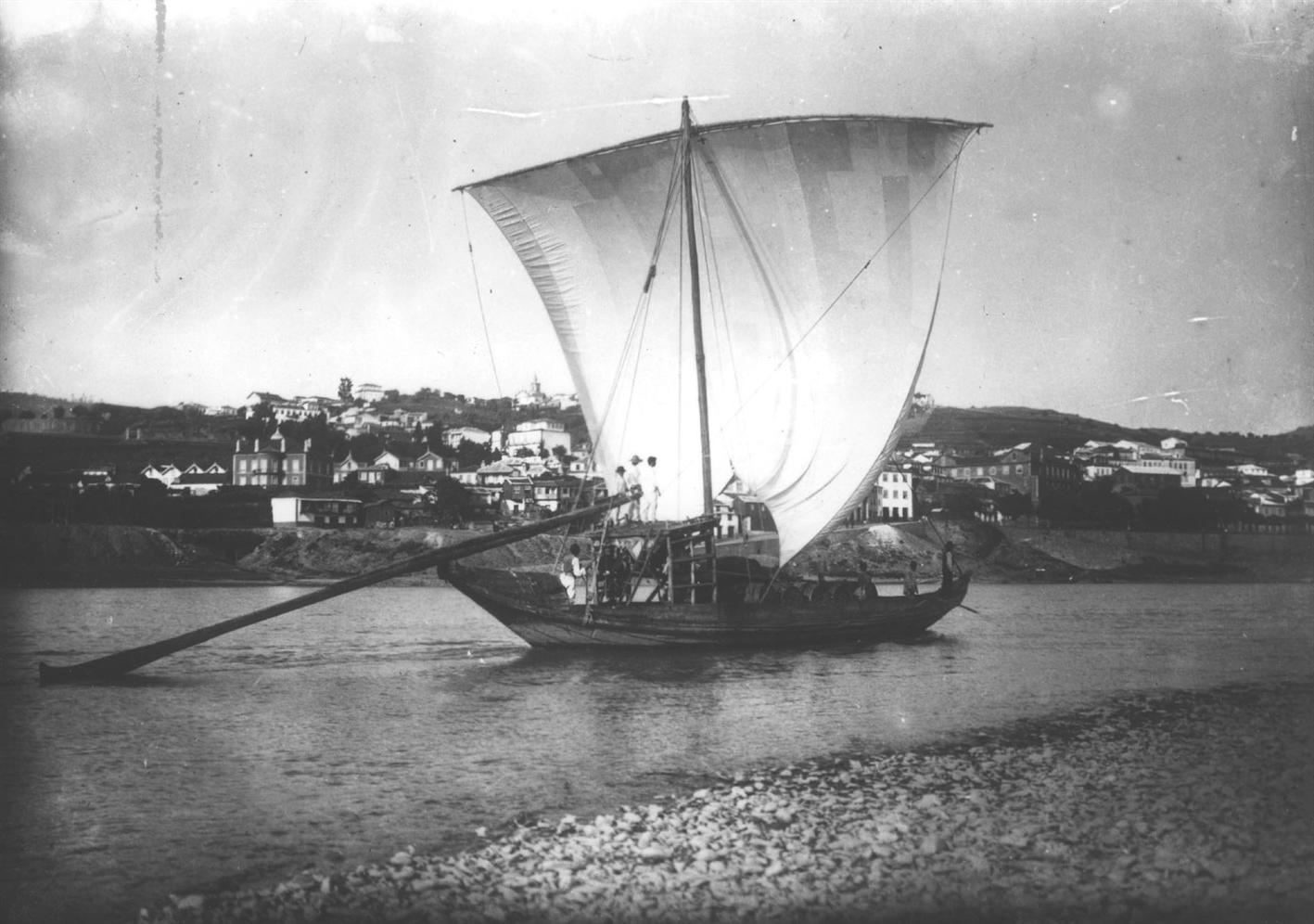 Aspecto de um barco rabelo navegando no rio Douro, com vista para a cidade da Régua.